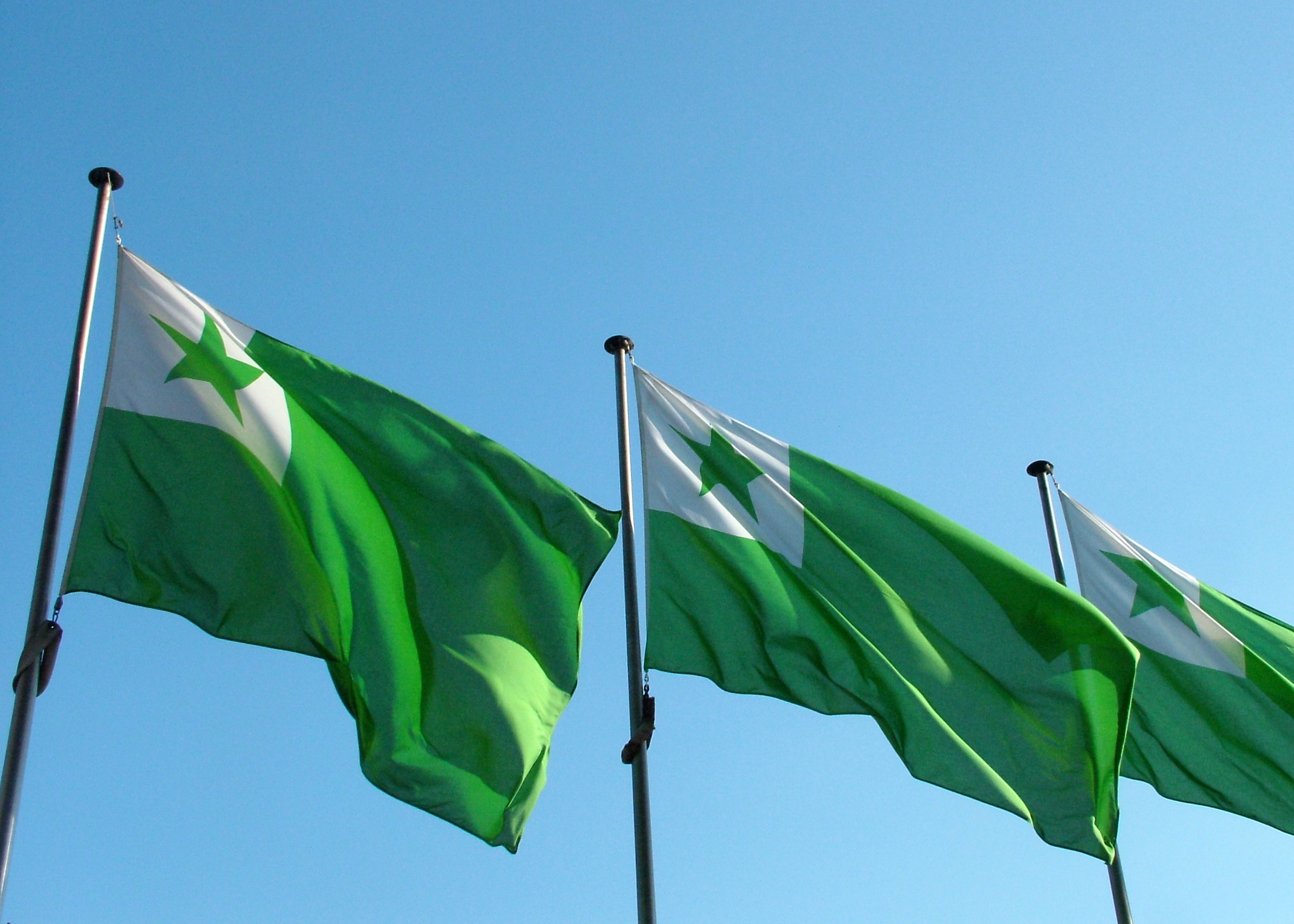 Flagoj esperantaj, antaux la kongresejo de la roterdama UK 2008.